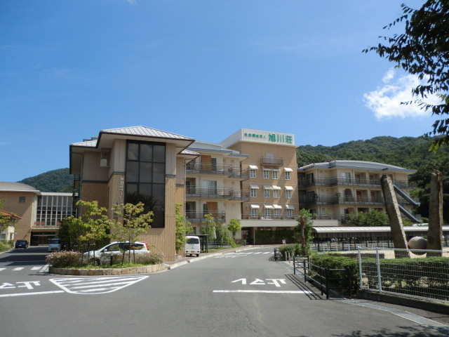 川崎学園の福祉施設、旭川荘です。